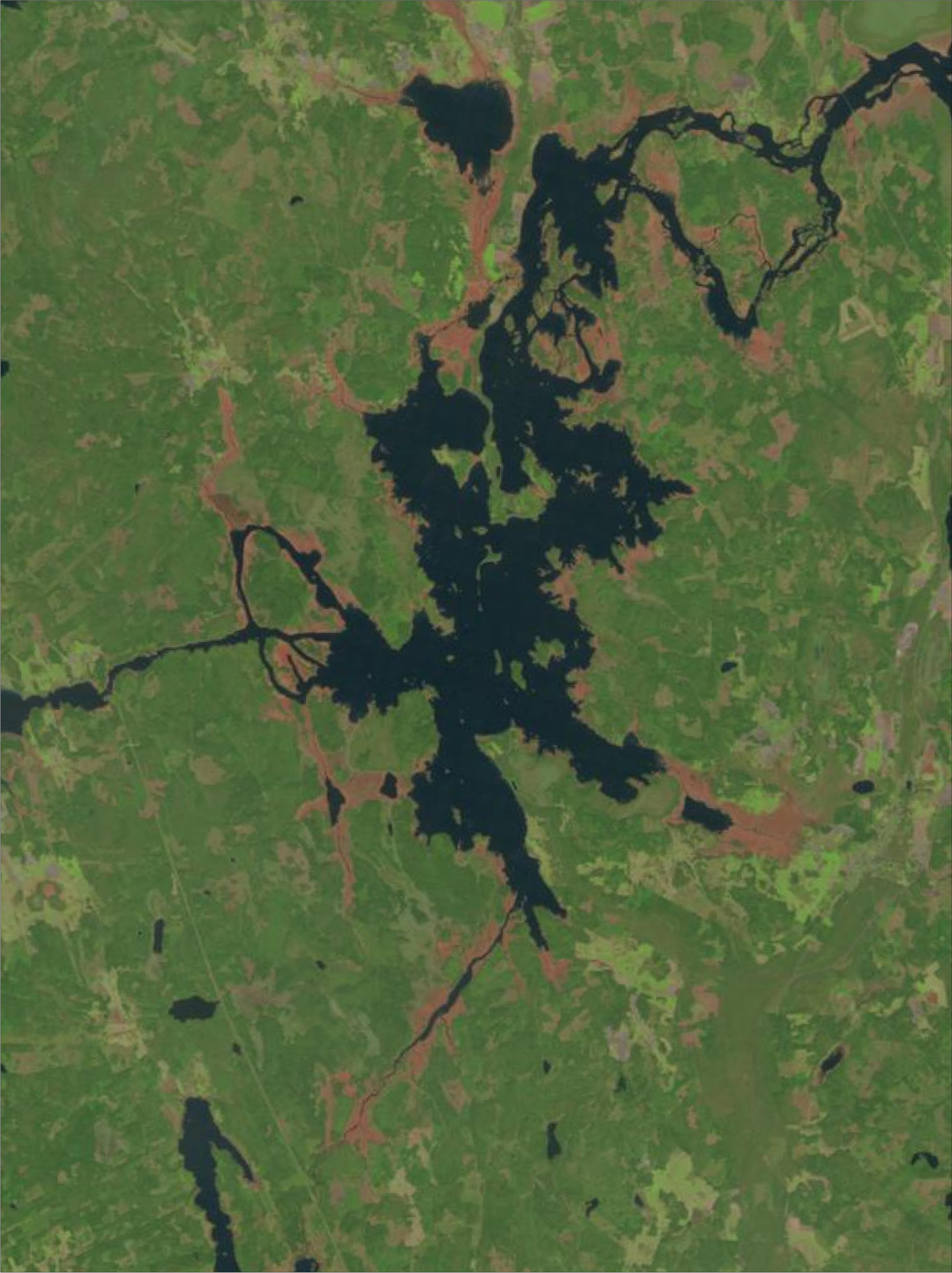 Photo satellite découpée Landsat 4-5 TM du 6 mai 2007 : le lac Färnebofjärden et le fleuve Dalälven sont à leur niveau normal, avec apparaissant nettement en rose les zones noyées lors d'une crue importante. Approximate geographic limits of this cropped photo : * N : 60.31 * S : 60.08 * E : 16.96 * W : 16.61 Projection : SWEREF zon 16° 30' (information); système géodésique WGS84.